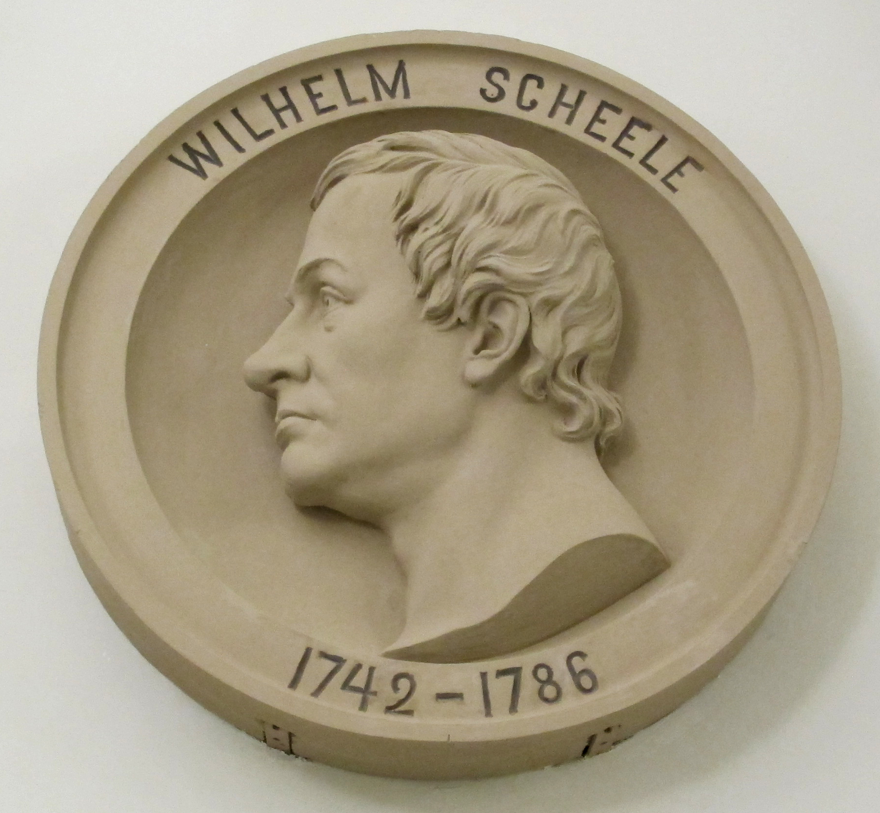 Firenze